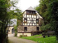 Kolliger Mühle Side of the Wohnhaus